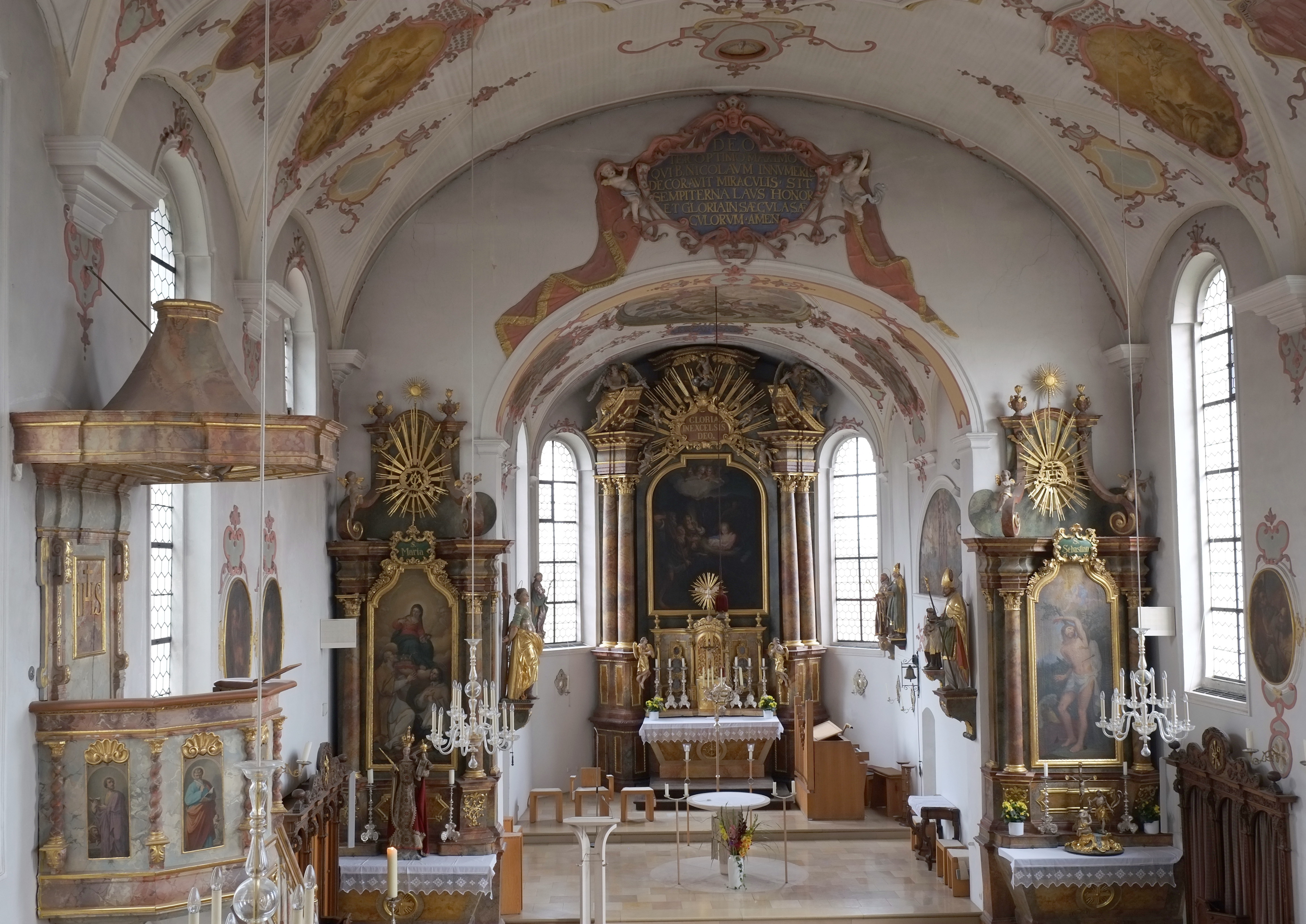 Katholische Pfarrkirche St. Nikolaus in Stadtbergen im Landkreis Augsburg (Bayern, Deutschland)